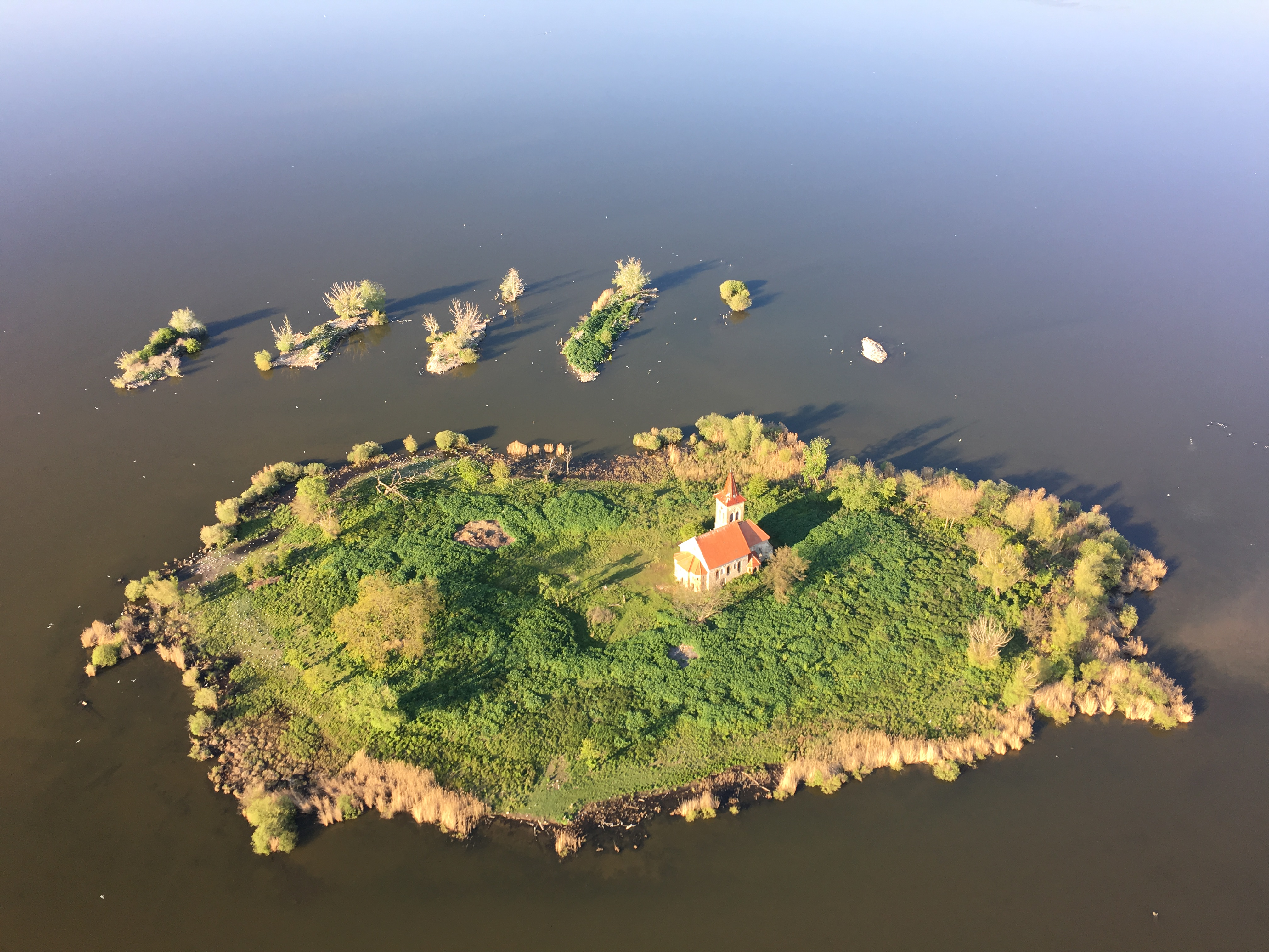 Letecká fotka kostela pořízená s motorového padákového kluzáku